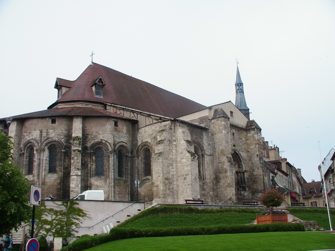 Chevet de l'église Sainte-Croix à Saint-Pourçain-sur-Sioule (03) Photo prise en mai 2006 par F5ZV